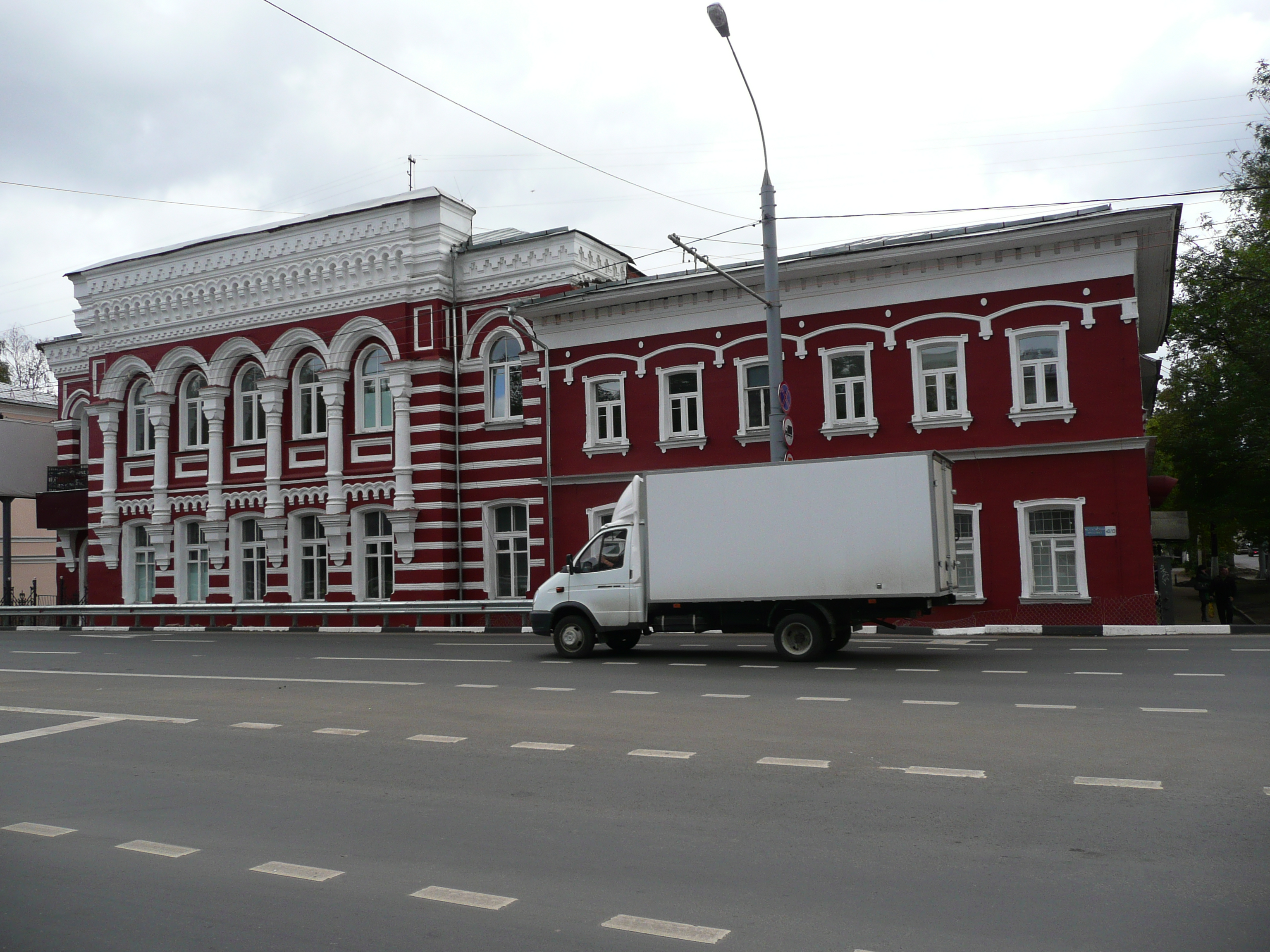 Здание Николаевского приюта: проспект Московский, 43/10, Ярославль, Ярославская область